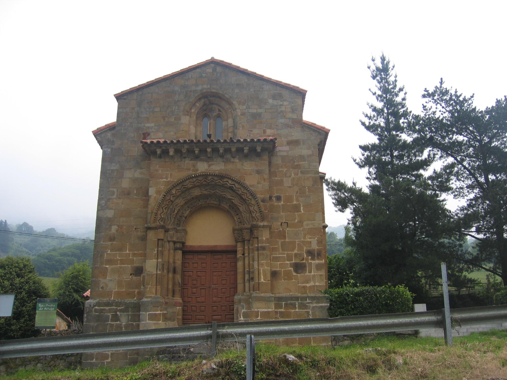 Fotografía del Iglesia de San Pedro de Arrojo en el concejo de Quirós.